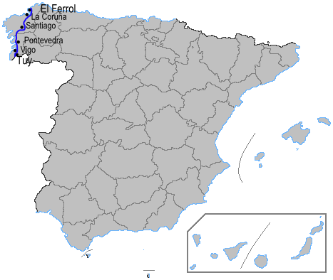 Mapa de la autopista AP9